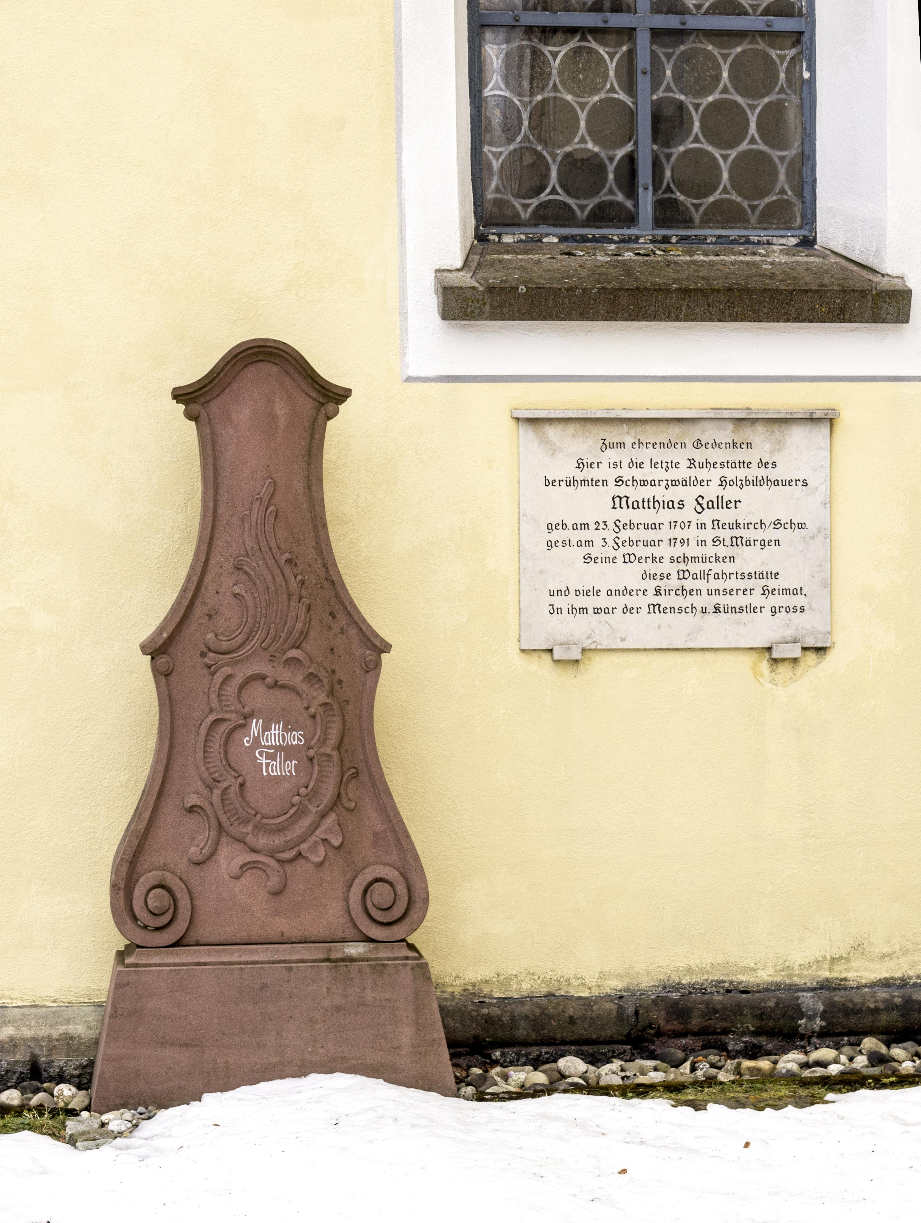 Bilder aus St. Märgen Grabstein Matthias Faller an der Klosterkirche